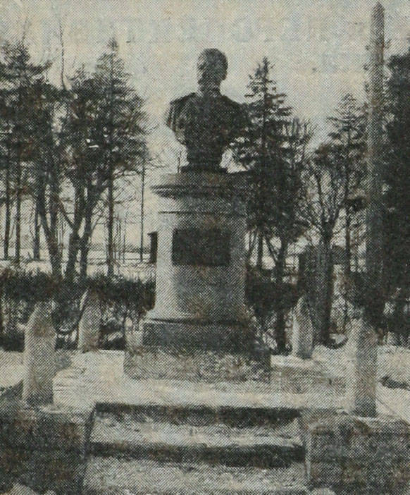 Бюст штабс-капитана гвардейской артиллерии Семёна Васильевича Панпушко